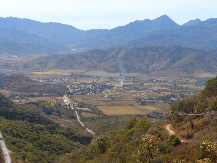 Vista de Talpa de Allende, Jalisco.